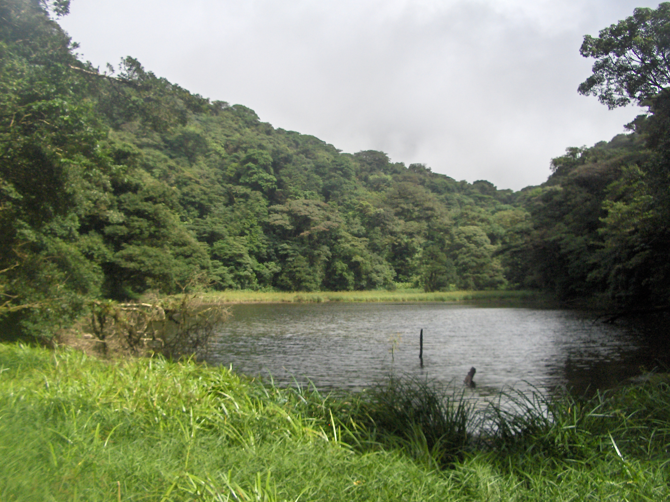 Cráter Inactivo Volcán Tenorio: Laguna Dantas, Bijagua, Upala.